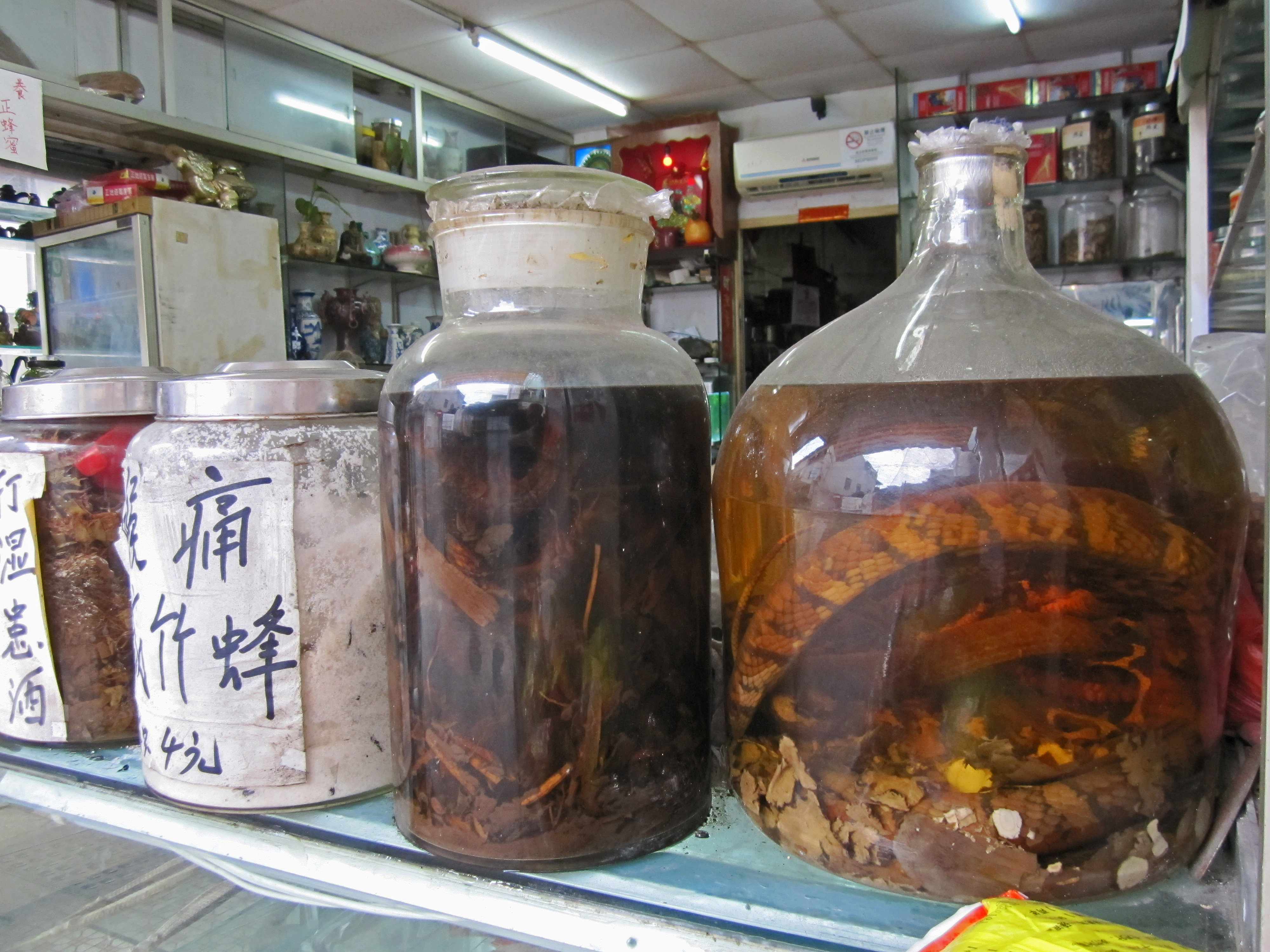 Snake oil jug in Macau Snake oil jug in Macau